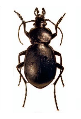 Carabus rumelicus